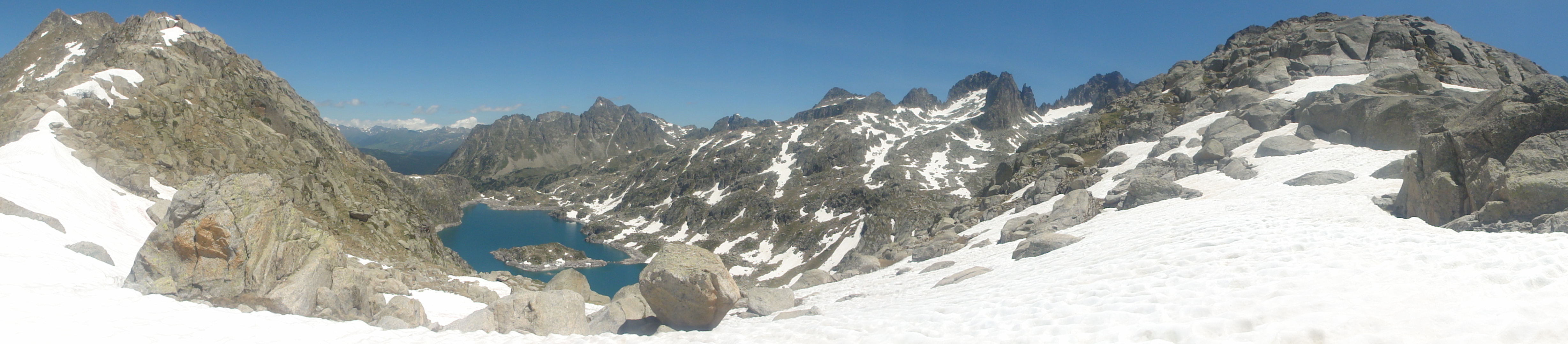 Estanh de Mar This is a a photo of a natural area in Catalonia, Spain, with id: ES510081